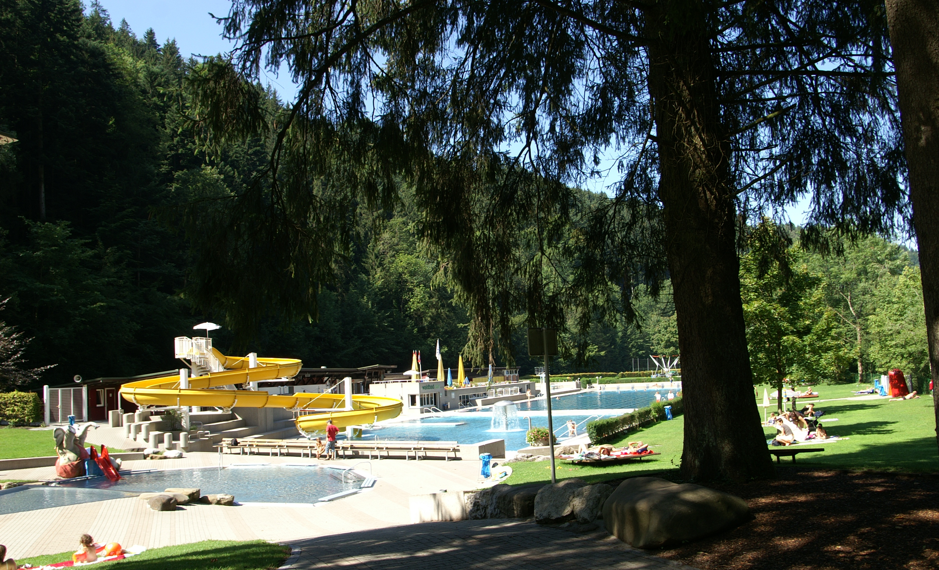 Blick auf das Waldbad Enz in Dornbirn